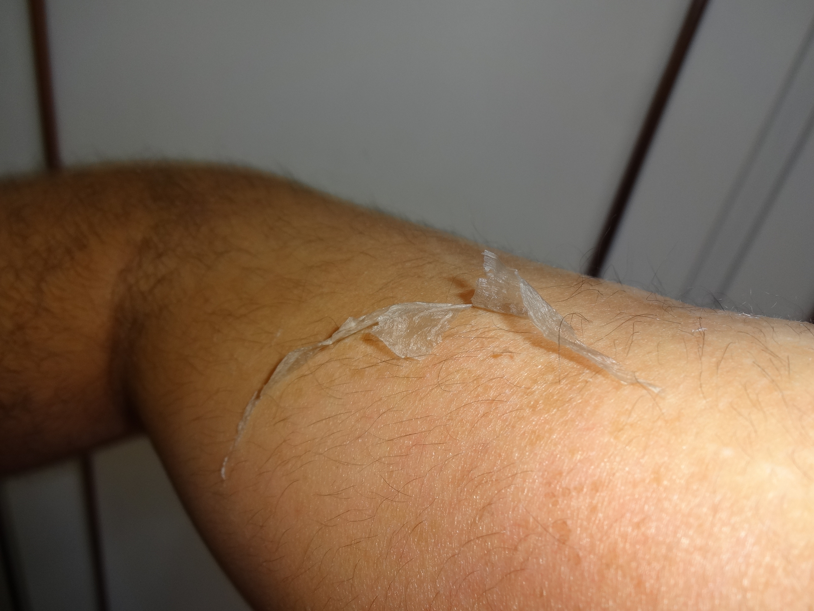 Pele do braço descamando devido à exposição ao sol.